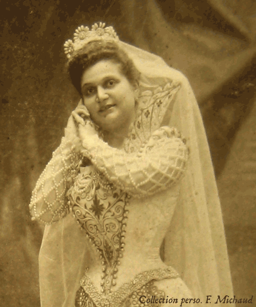 La cantatrice Alba Chrétien-Vaguet, falcon (soprano) à l'Opéra de Paris entre 1892 et 1903. Ici dans le rôle de Valentine, dans les Huguenots, en 1894. Portrait extrait d'une photo des studios Caustin & Berger, prise entre 1893 et 1894. Collection personnelle de F. Michaud (cette photo réalisée à titre privé pour la cantatrice n'a jamais été publiée, bien que d'autres issues de la même série l'aient été dans la revue Théâtre).